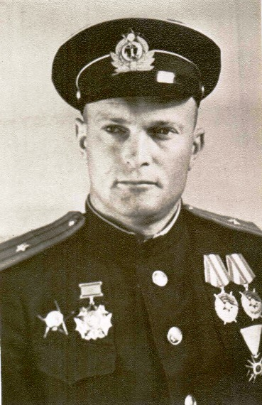 Kommandant der Donauflottille (1945)